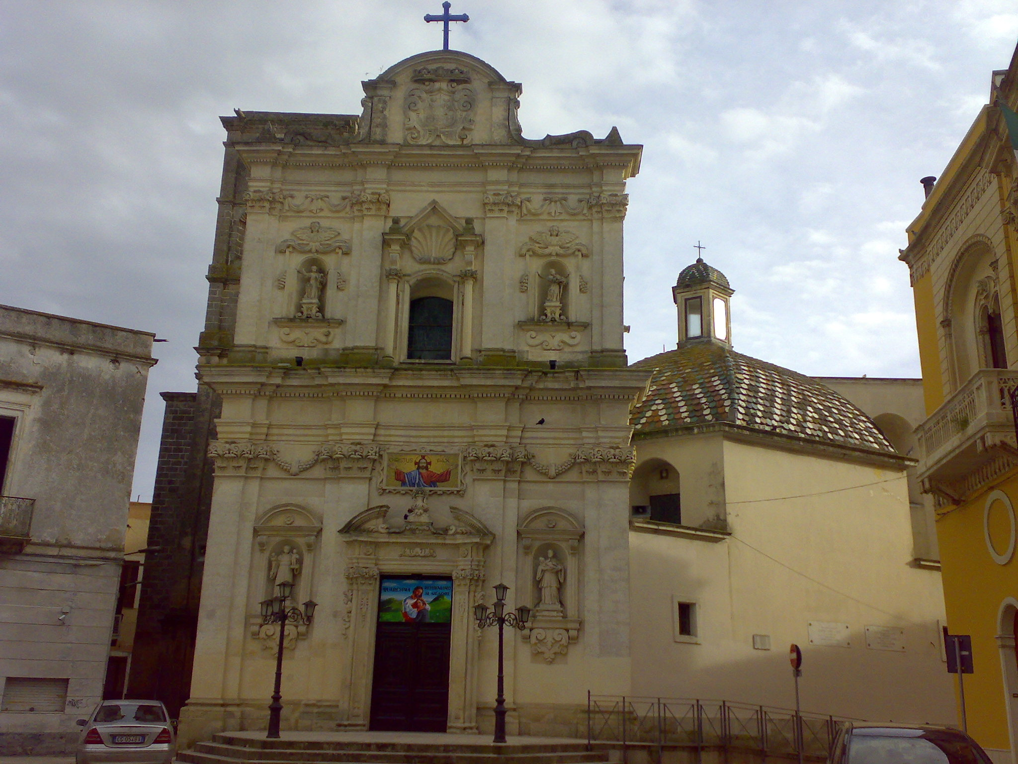 Chiesa madre di Monteroni di Lecce